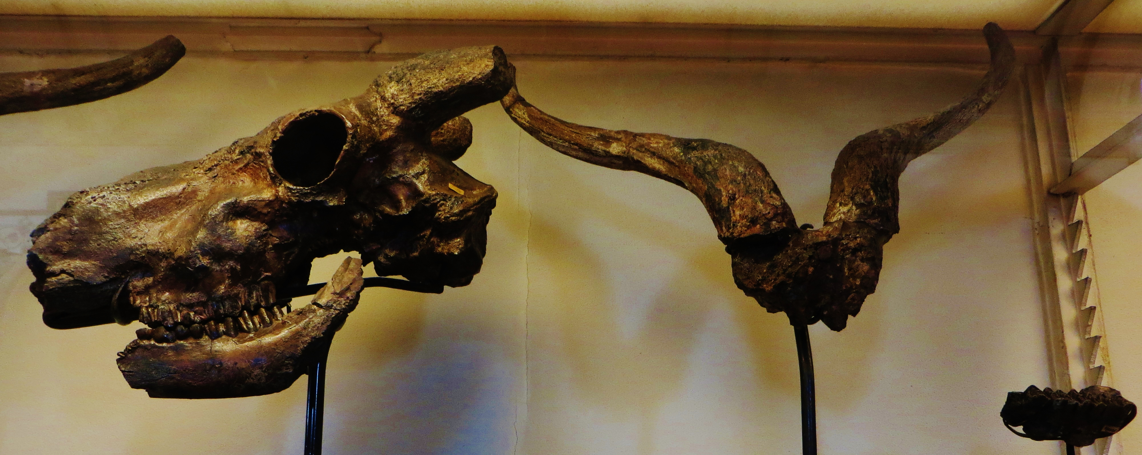 Fossil of Menelikia, an extinct mammal- Took the photo at Musee d'Histoire Naturelle, Paris